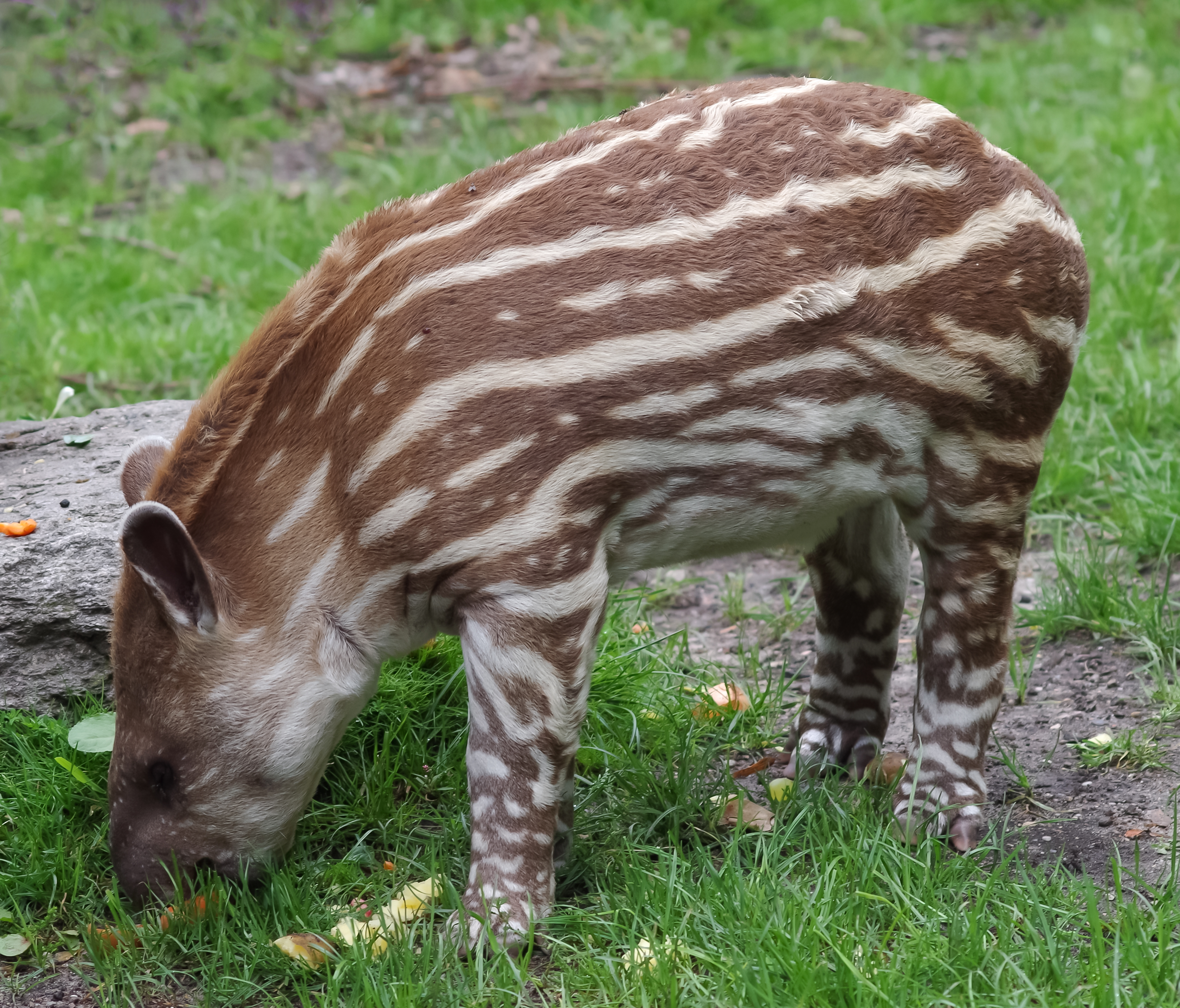 Jeune tapir au zoo de Hambourg